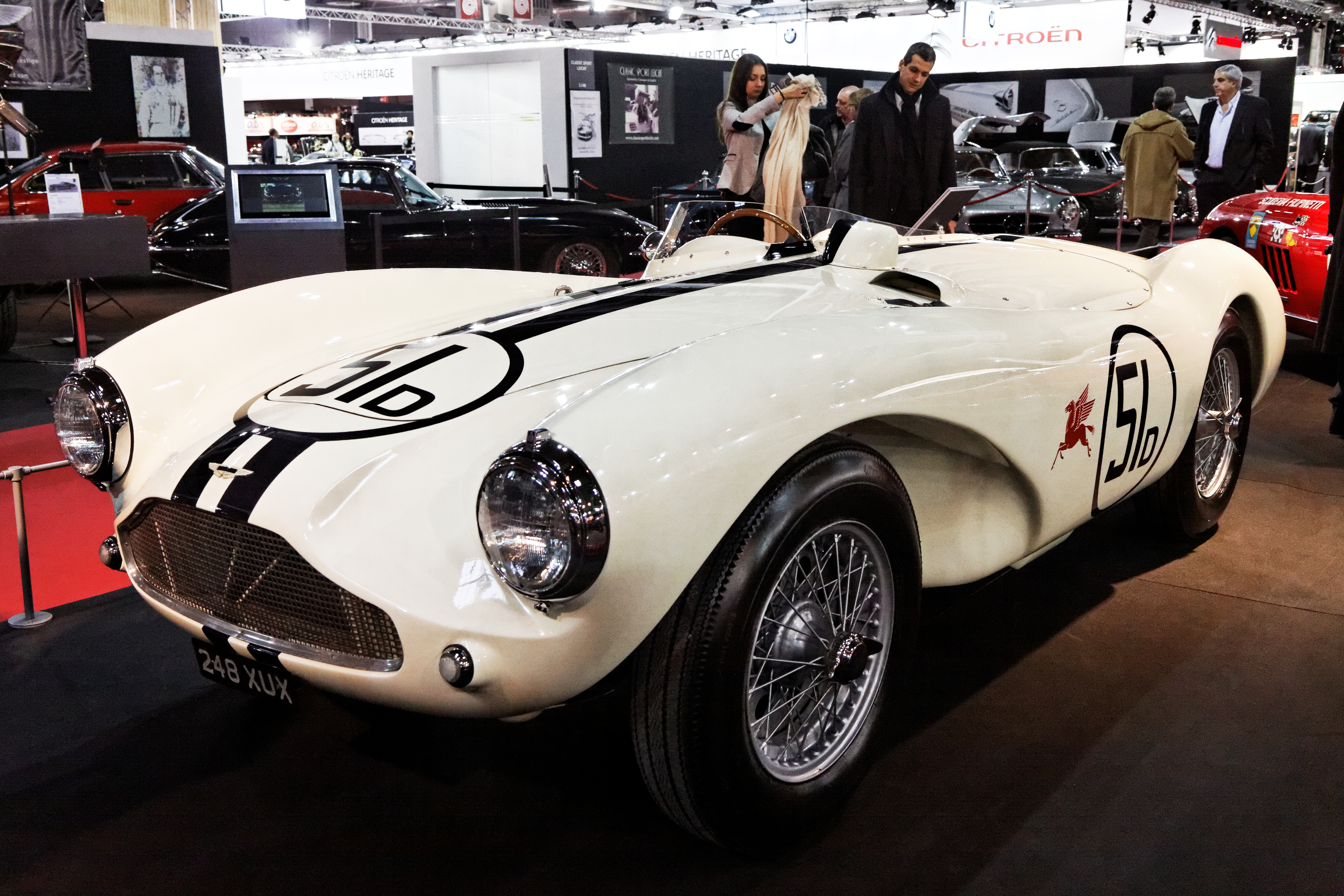 Une Aston Martin DB3 S présentée lors du salon retromobile 2013.